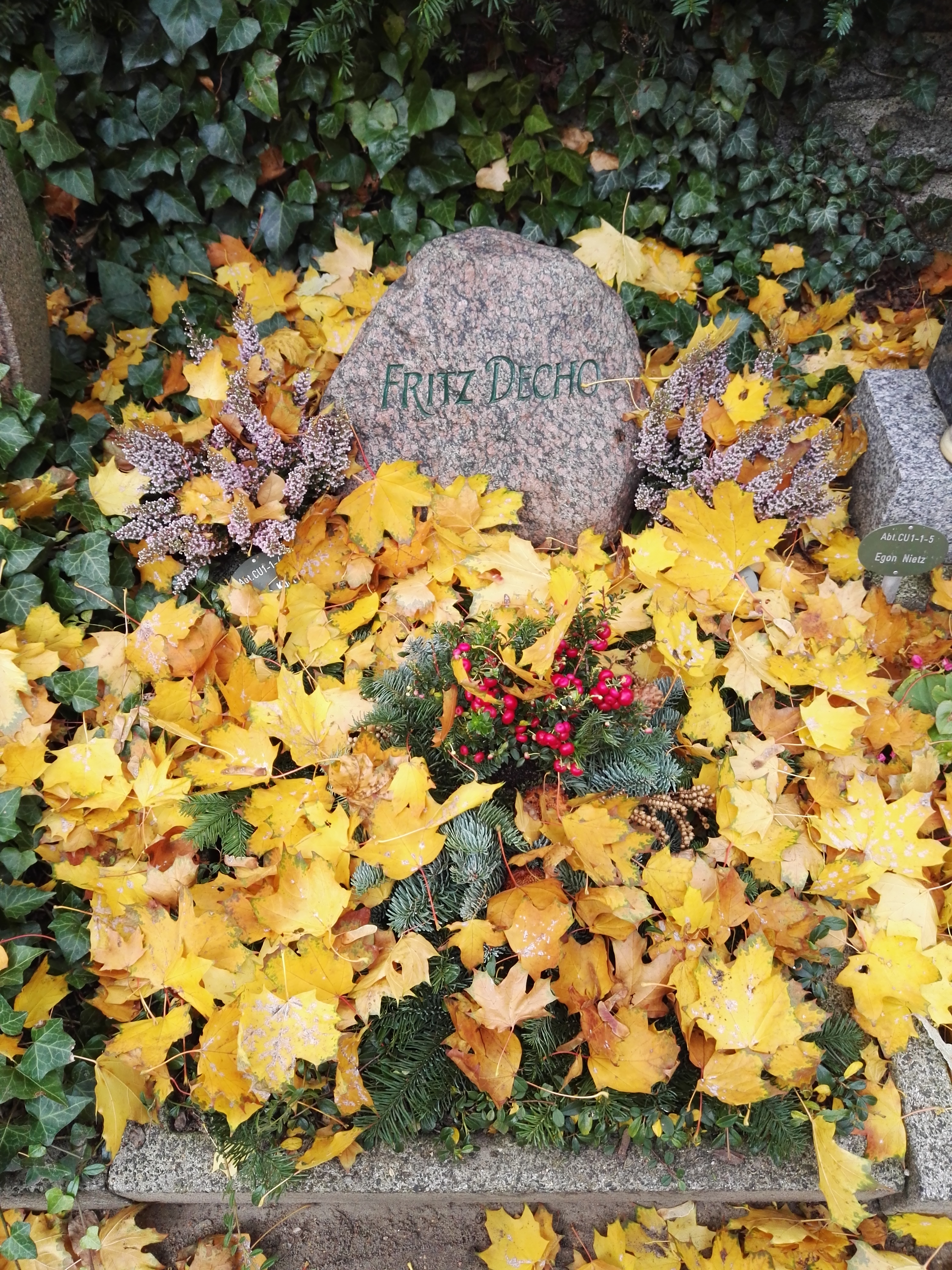 Grab von Fritz Decho auf dem Friedhof der Dorotheenstädtischen und Friedrichswerderschen Gemeinden in Berlin-Mitte